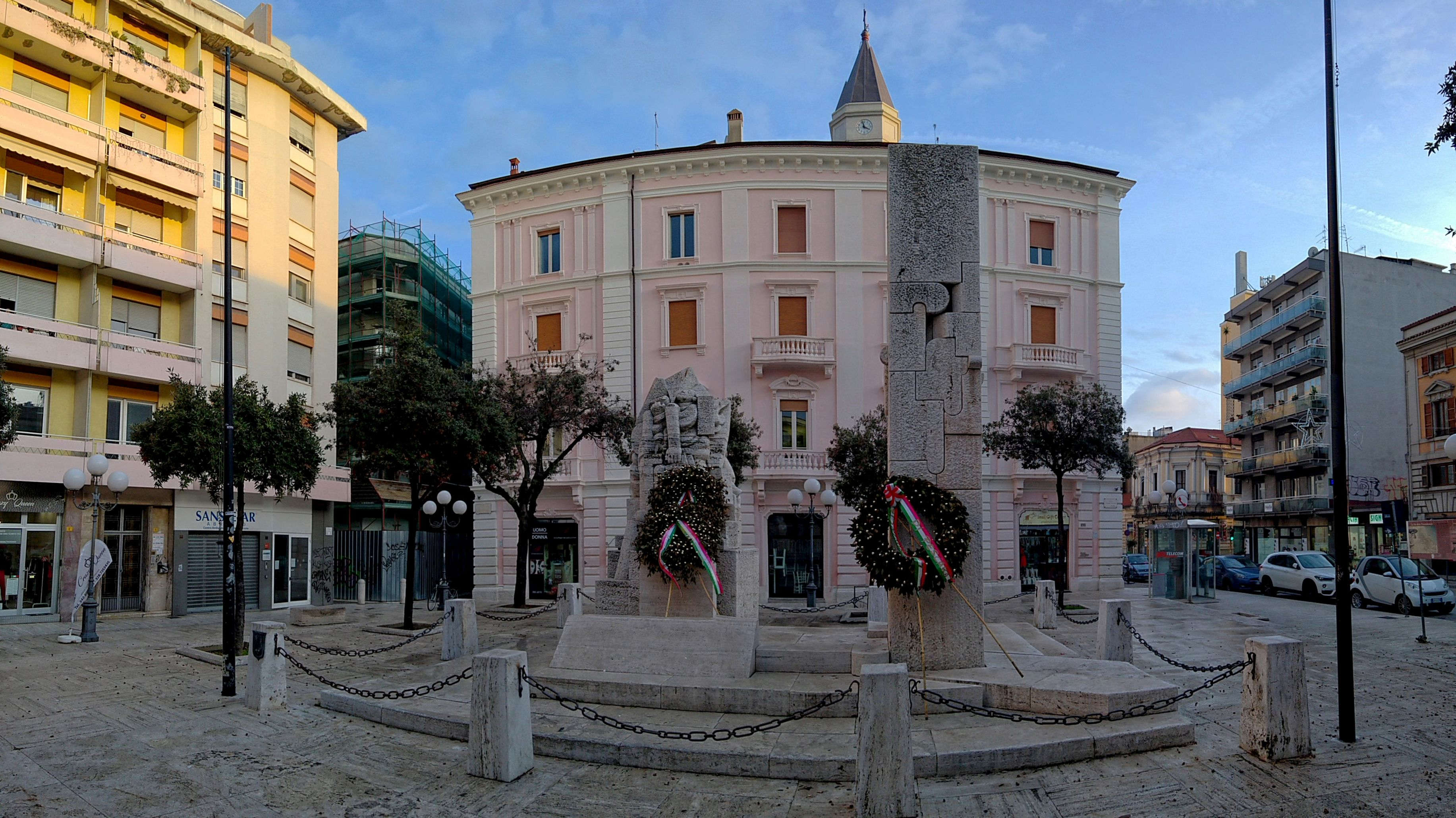 Pescara 2018